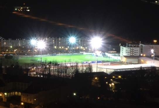 Stade René-Hologne Vesoul - Nuit